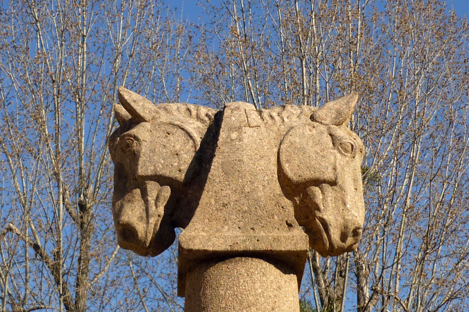 Pferdetränkbrunnen von Paul Polte an der Bautzner Str. / Holzhofgasse in Dresden-Neustadt (aufgestellt 1921 vom Tierschutzverein)